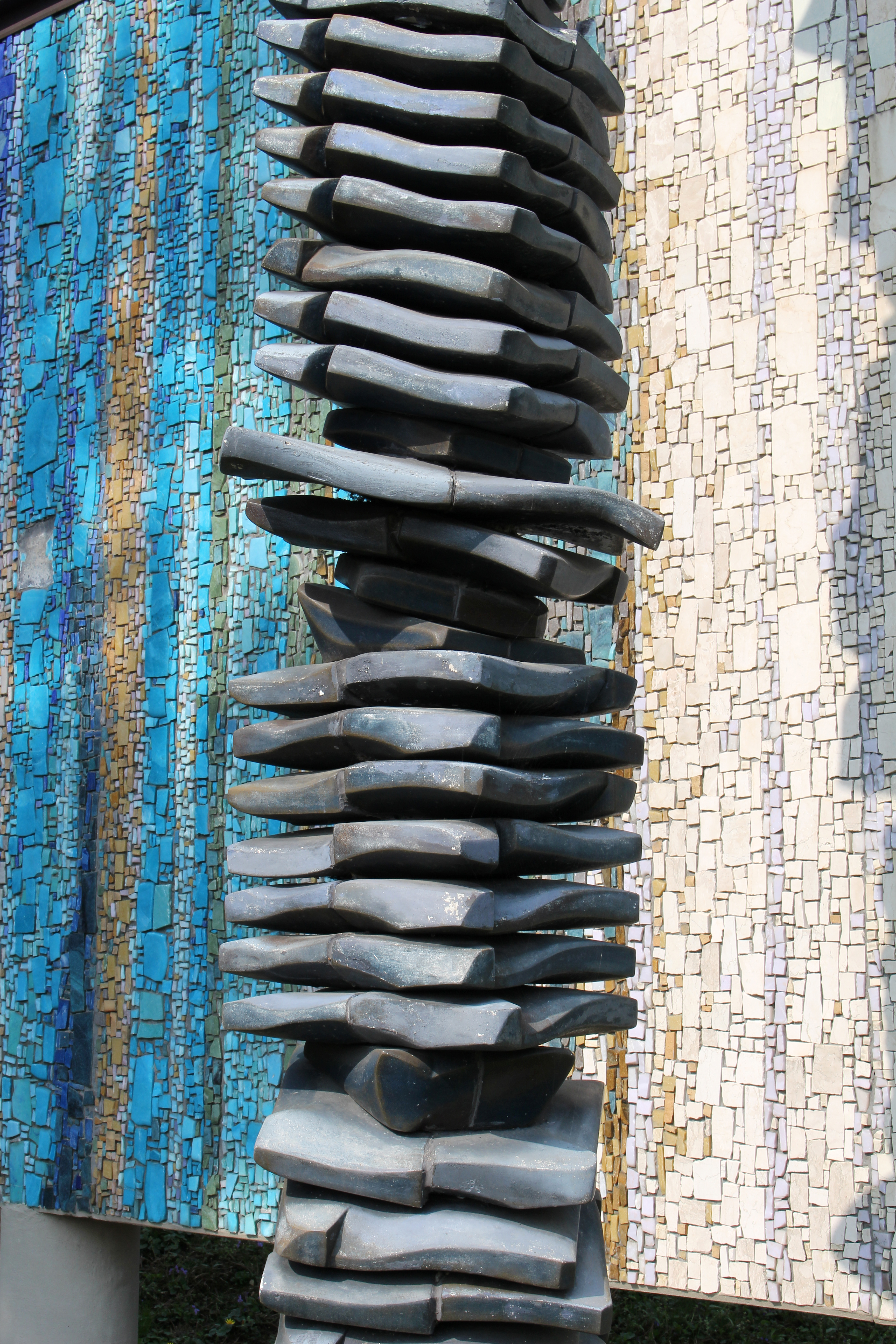 Hartsteinzeugplastik Bewegungsrhythmus von Kurt Ohnsorg, 1970, dahinter das Mosaik Organische Struktur von Heinrich Tahedl, 1969